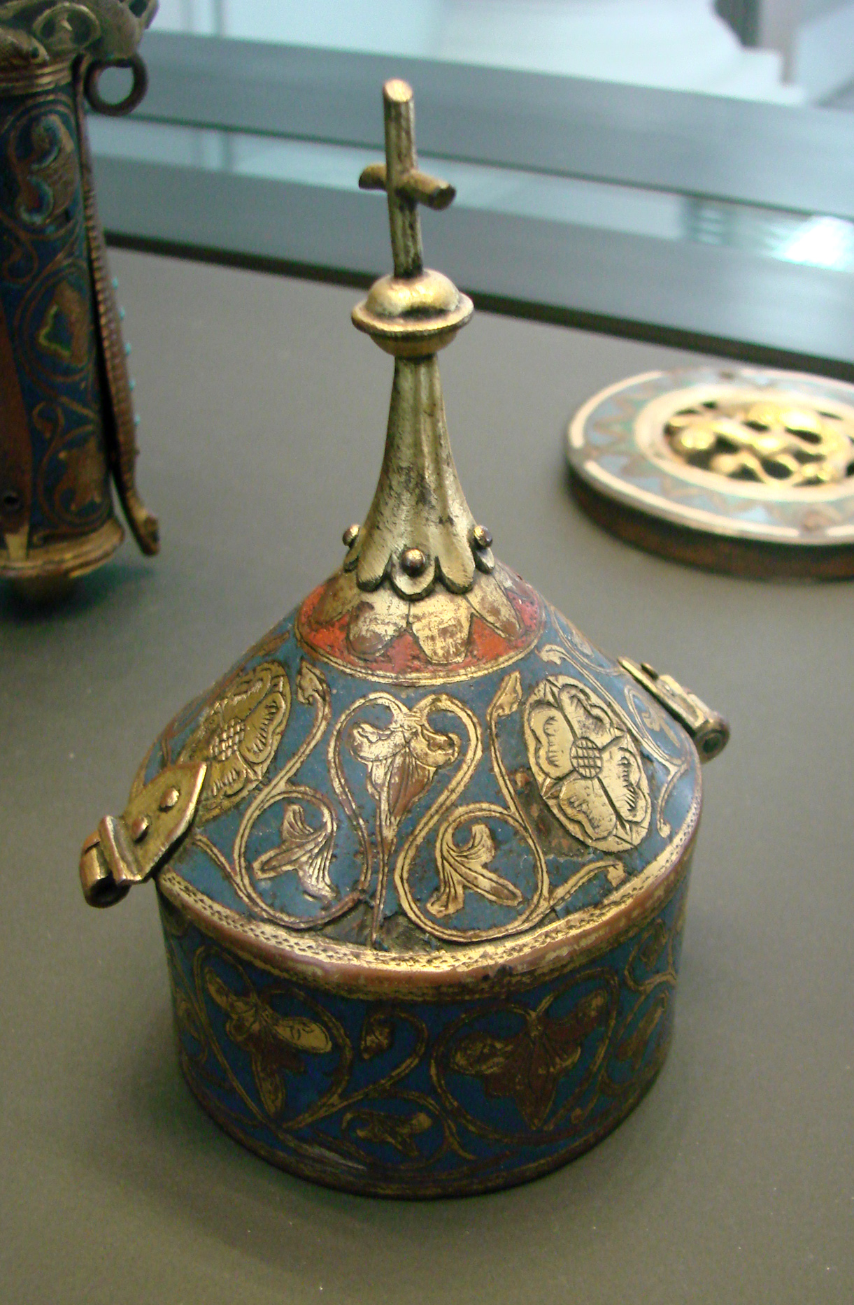 Pyxide à décor de rinceaux et de palmettes. Cuivre doré et émail champlevé, Limoges, vers 1250.